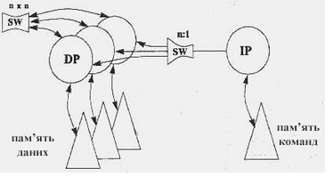 Архітектура